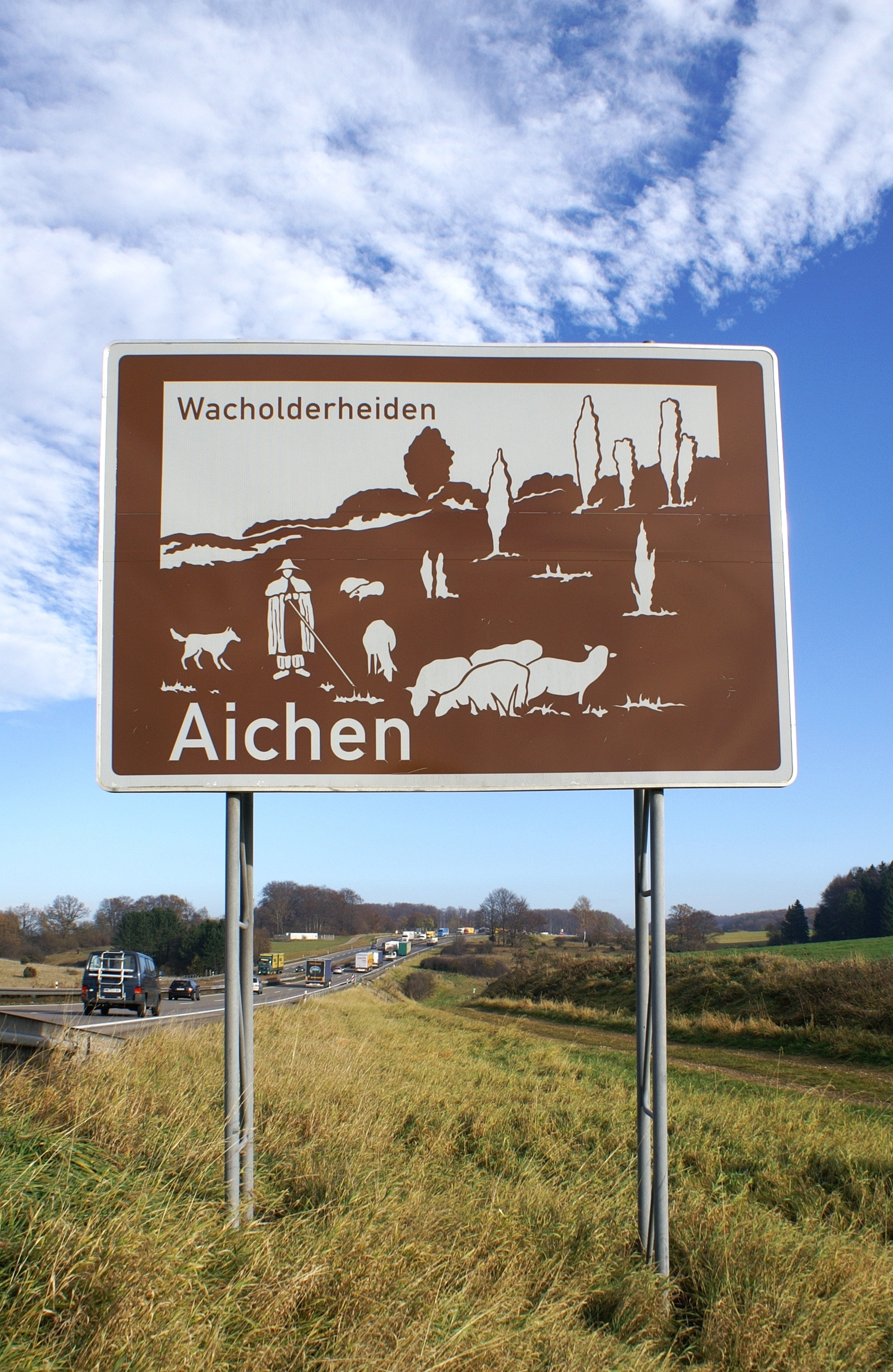 Das Naturschutzgebiet Mönchsteig bei Aichen hat eine Größe von 49,9 Hektar